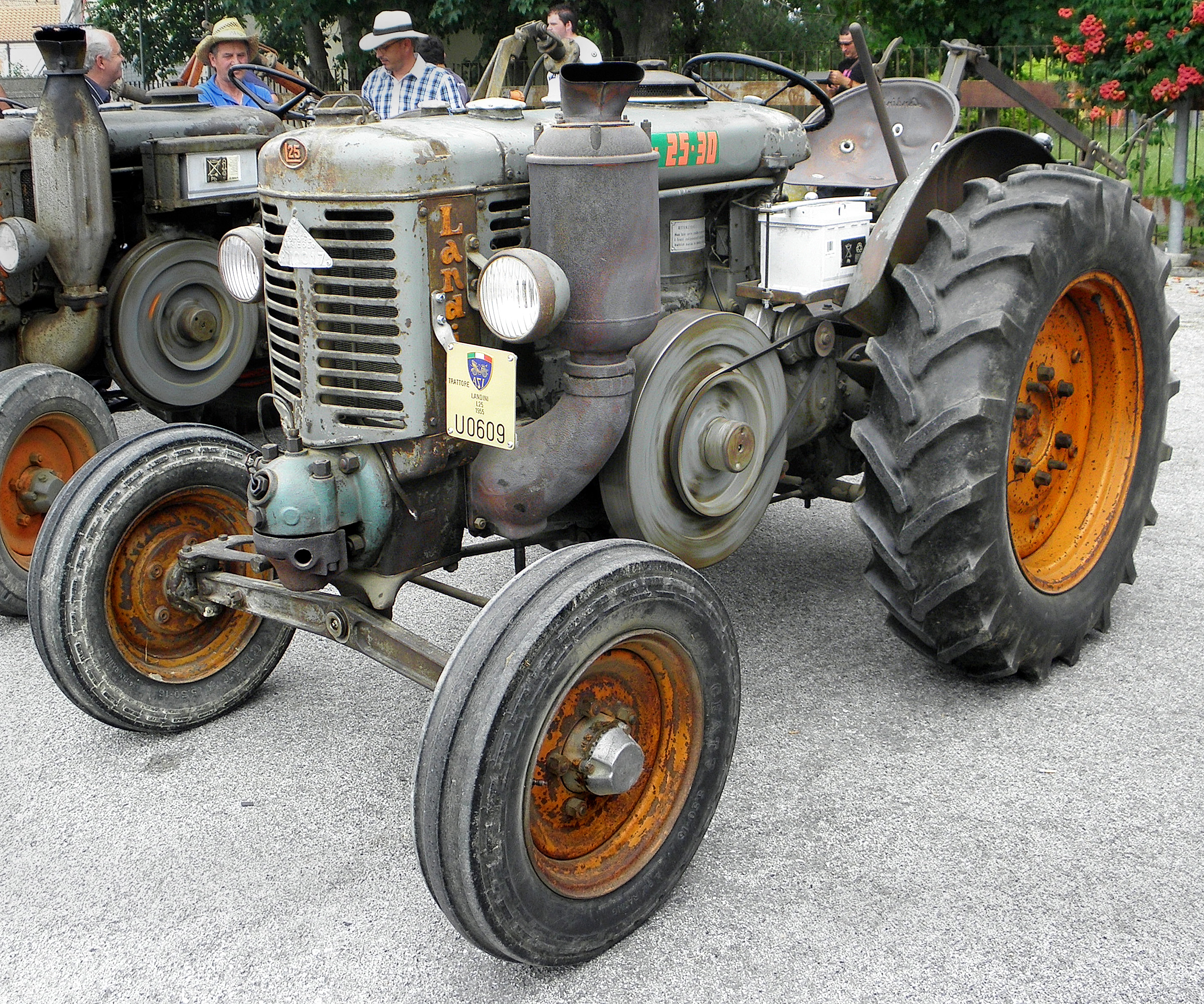 Concadirame, frazione di Rovigo: il Landini L25 (testacalda) ASI U0609 presenti al raduno di trattori agricoli d'epoca ed aratura d'epoca, 29 giugno 2014.